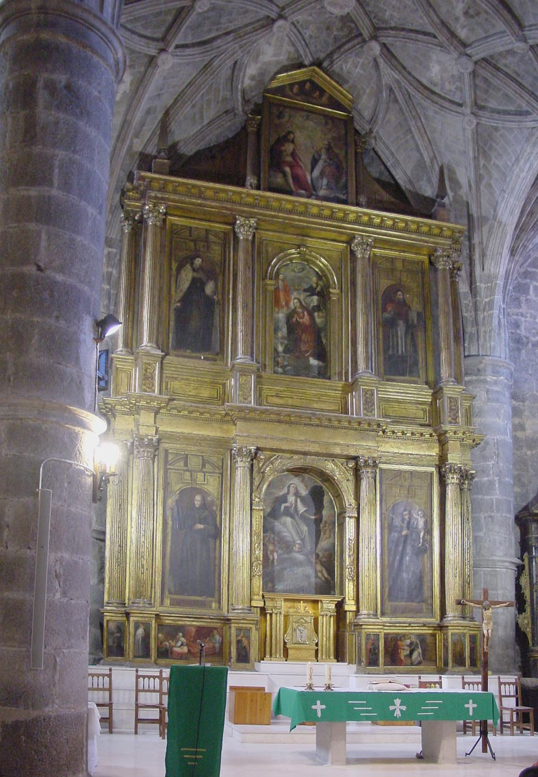 Retablo de la parroquia de Nuestra Señora de la Asunción en Laguna de Duero (Valladolid, España). En 1622 este retablo pertenecía al convento de San Francisco de Valladolid, (extinguido desde 1836). El convento vendió el retablo 50 años más tarde a la parroquia de Laguna de Duero por la cantidad de 5.000 reales. Es un retablo de pinturas, cuyos autores son Diego Valentín Díaz y Diego Díez Ferreras (siglo XVII).